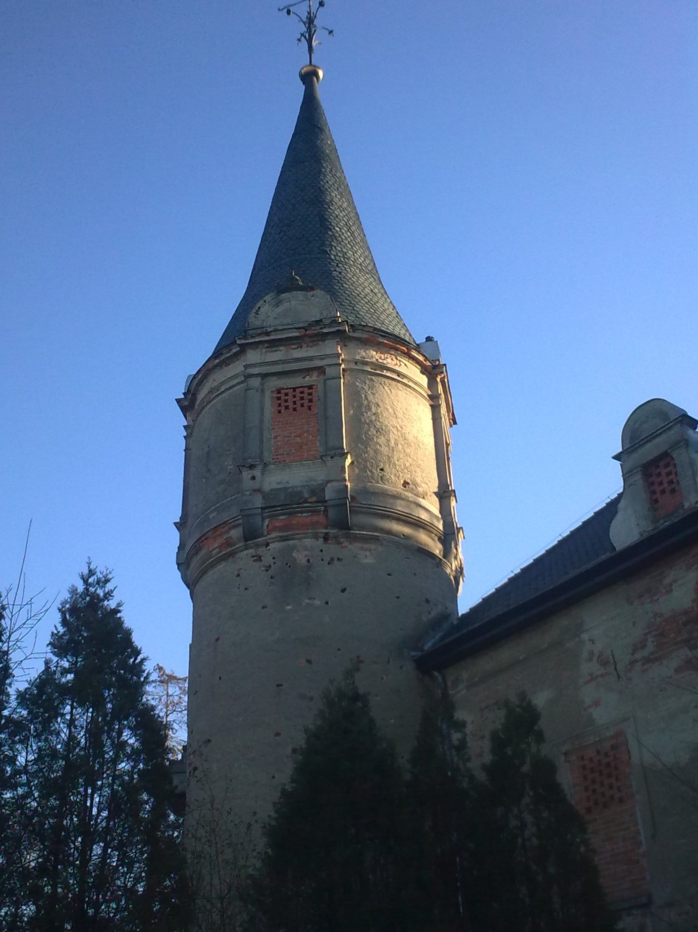 Pałac w Wiśniowej